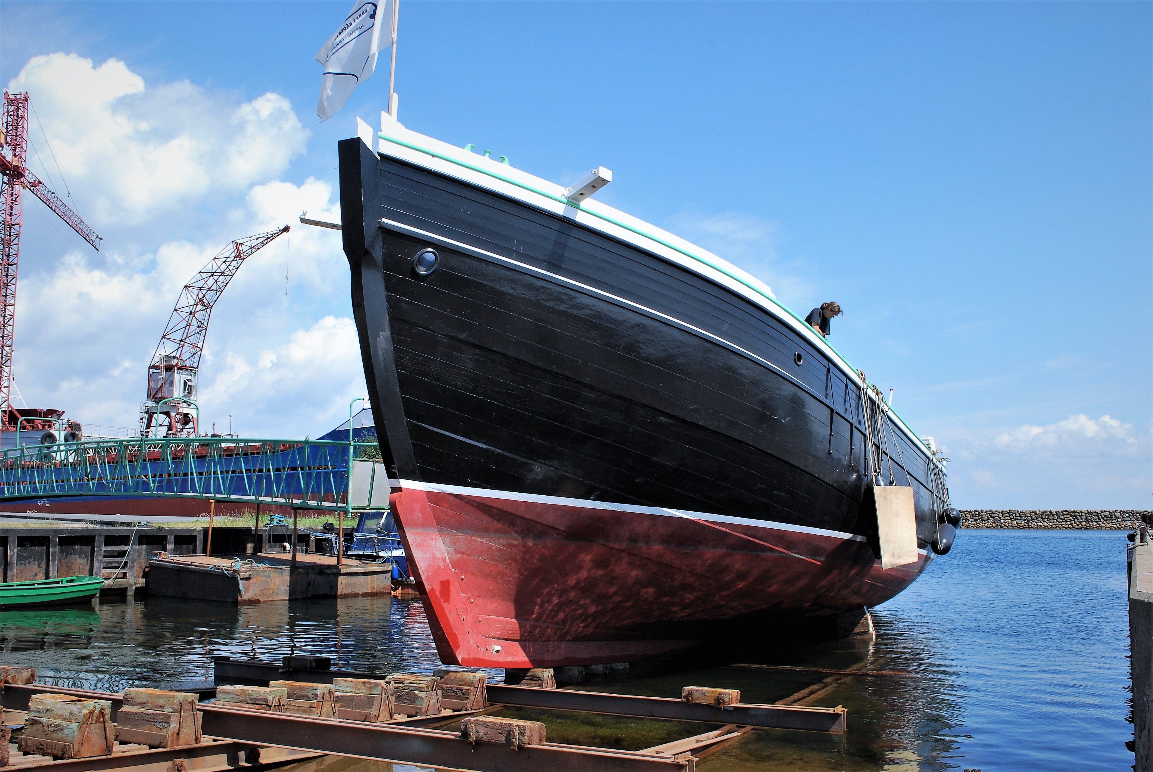 Skonnerten Bonavista, Marstal, Danmark